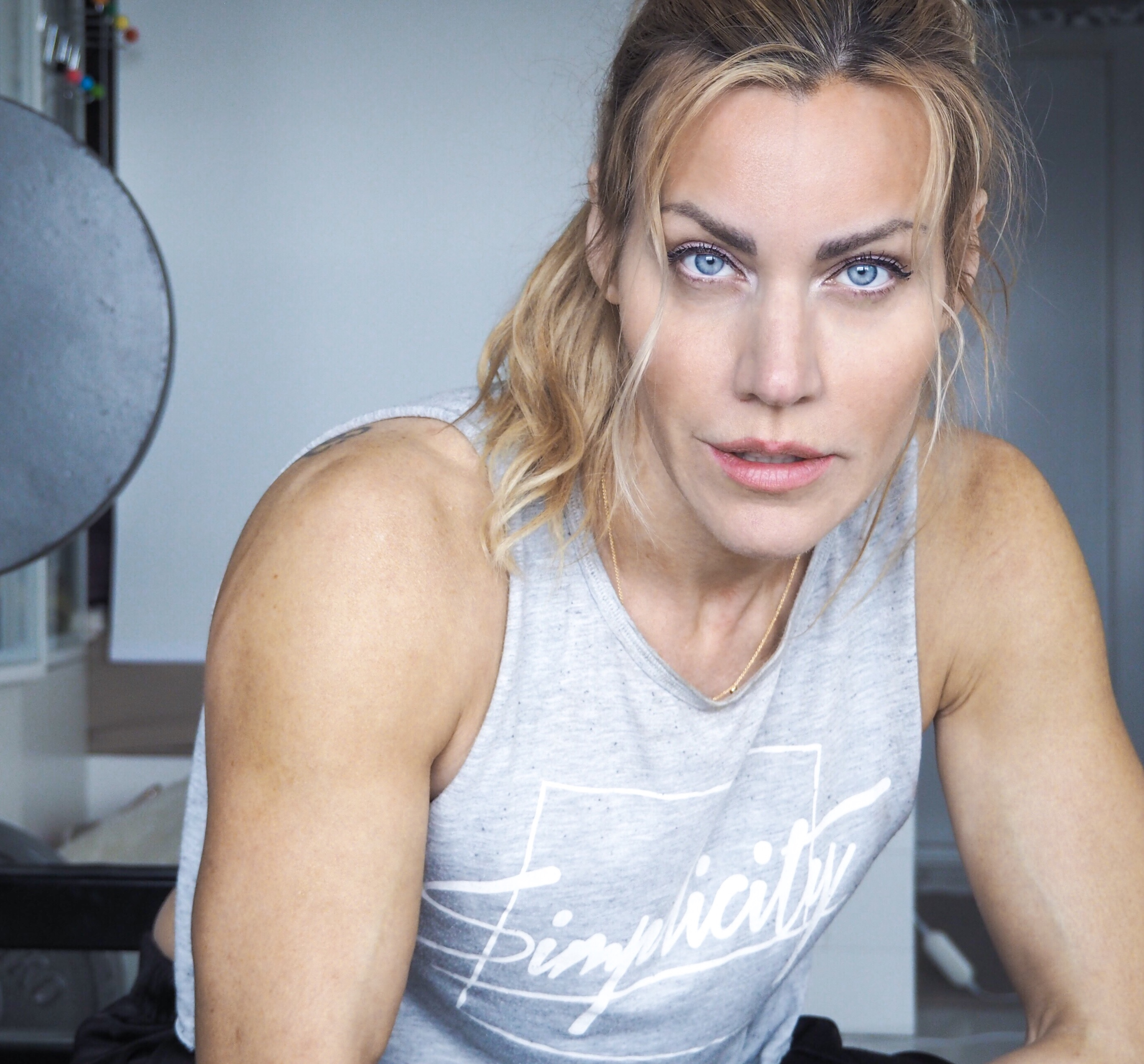 Portrett